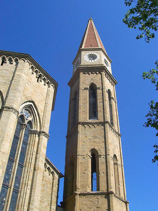 Arezzo - Campanile del Duomo